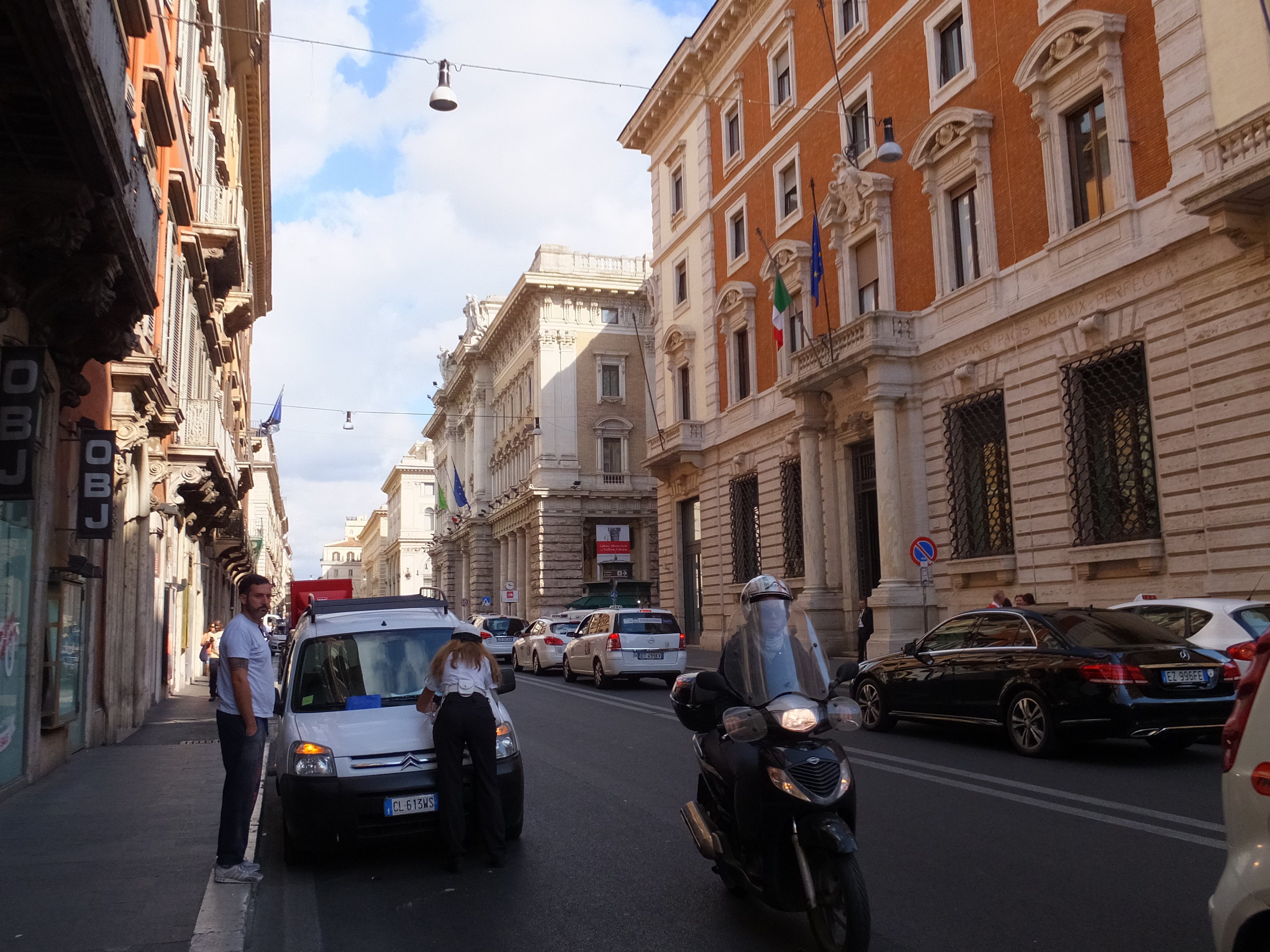 科爾索街 Via del Corso